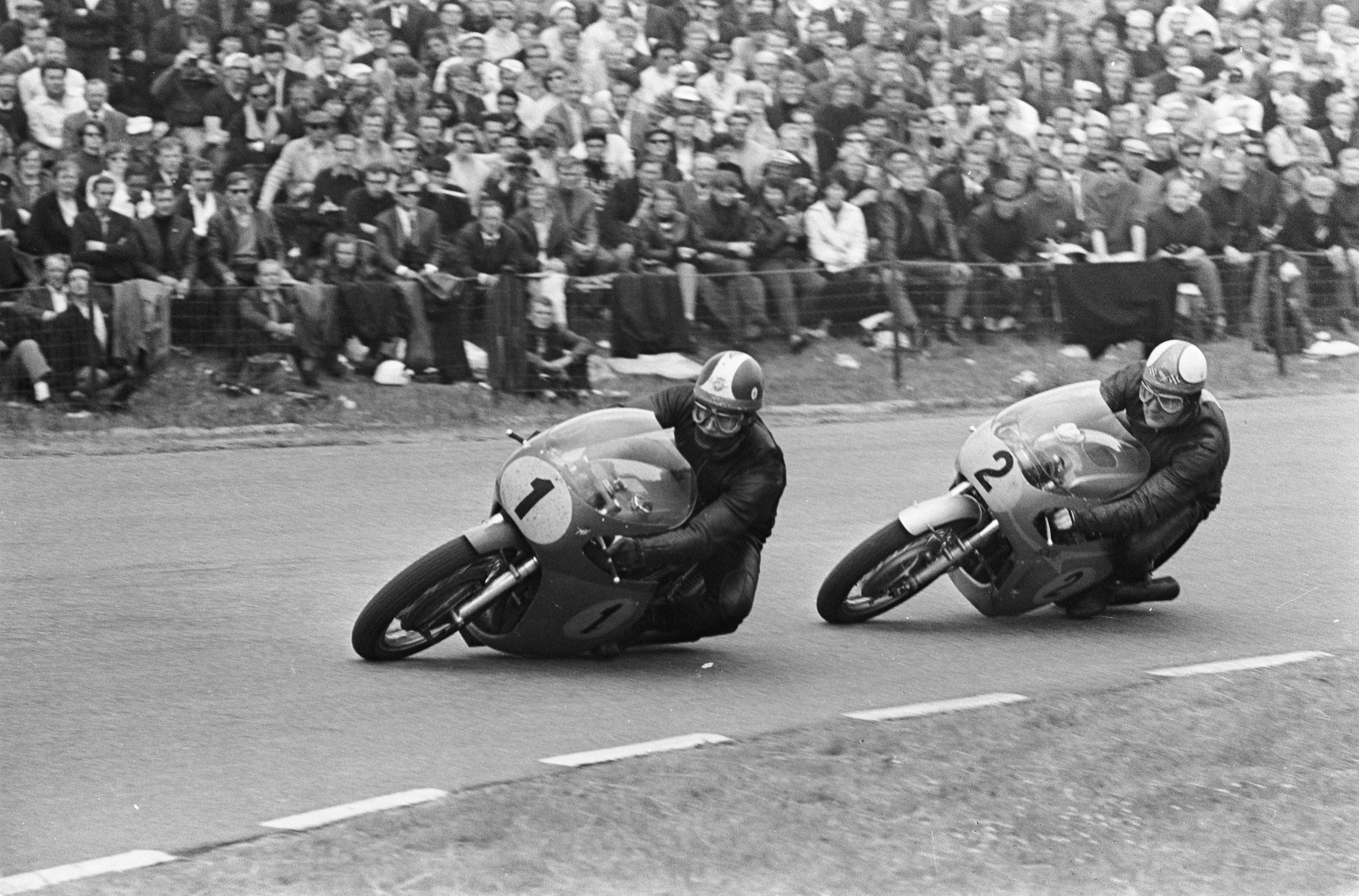 Collectie / Archief : Fotocollectie Anefo Reportage / Serie : TT Assen 1967 Beschrijving : 500cc race. Mike Hailwood (nr. 2) in duel met Giacomo Agostini (nr. 1) Datum : 24 juni 1967 Locatie : Assen, Drenthe Trefwoorden : motorsport Persoonsnaam : Agostini, Giacomo, Hailwood, Mike Fotograaf : Fotograaf Onbekend / Anefo Auteursrechthebbende : Nationaal Archief Materiaalsoort : Negatief (zwart/wit) Nummer archiefinventaris : bekijk toegang 2.24.01.05 Bestanddeelnummer : 920-4317